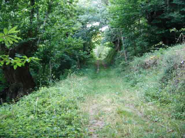 O Reboledo (Ourense)